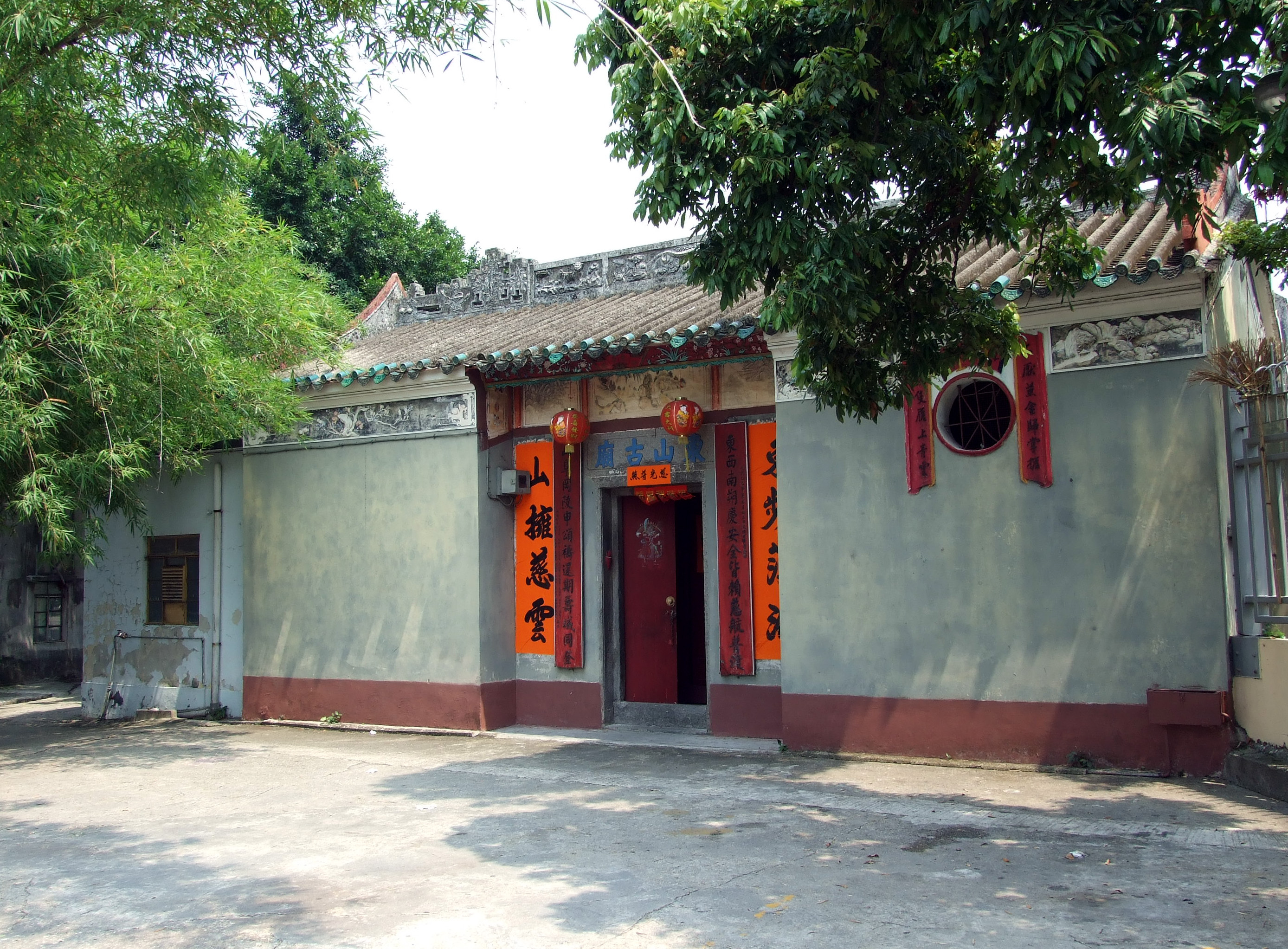 中文（香港）: 東山古廟